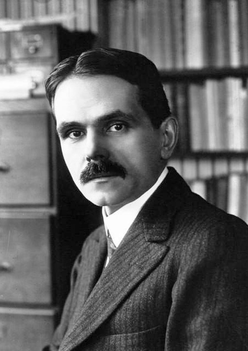 Landry, député de la Corse [photographie de presse]